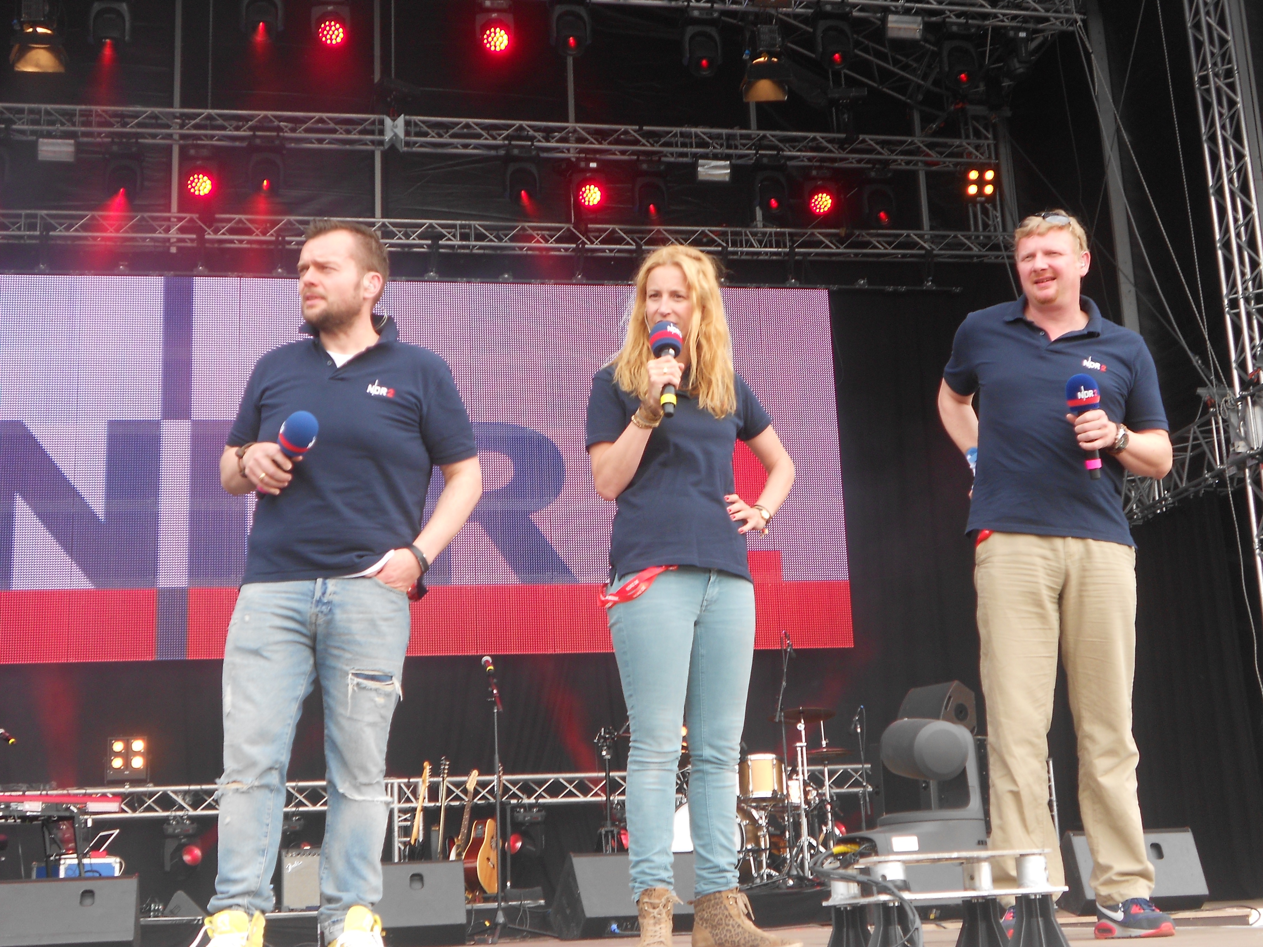 Die NDR 2 Moderatoren Jens Mahrhold, Ilka Petersen und Holger Ponik